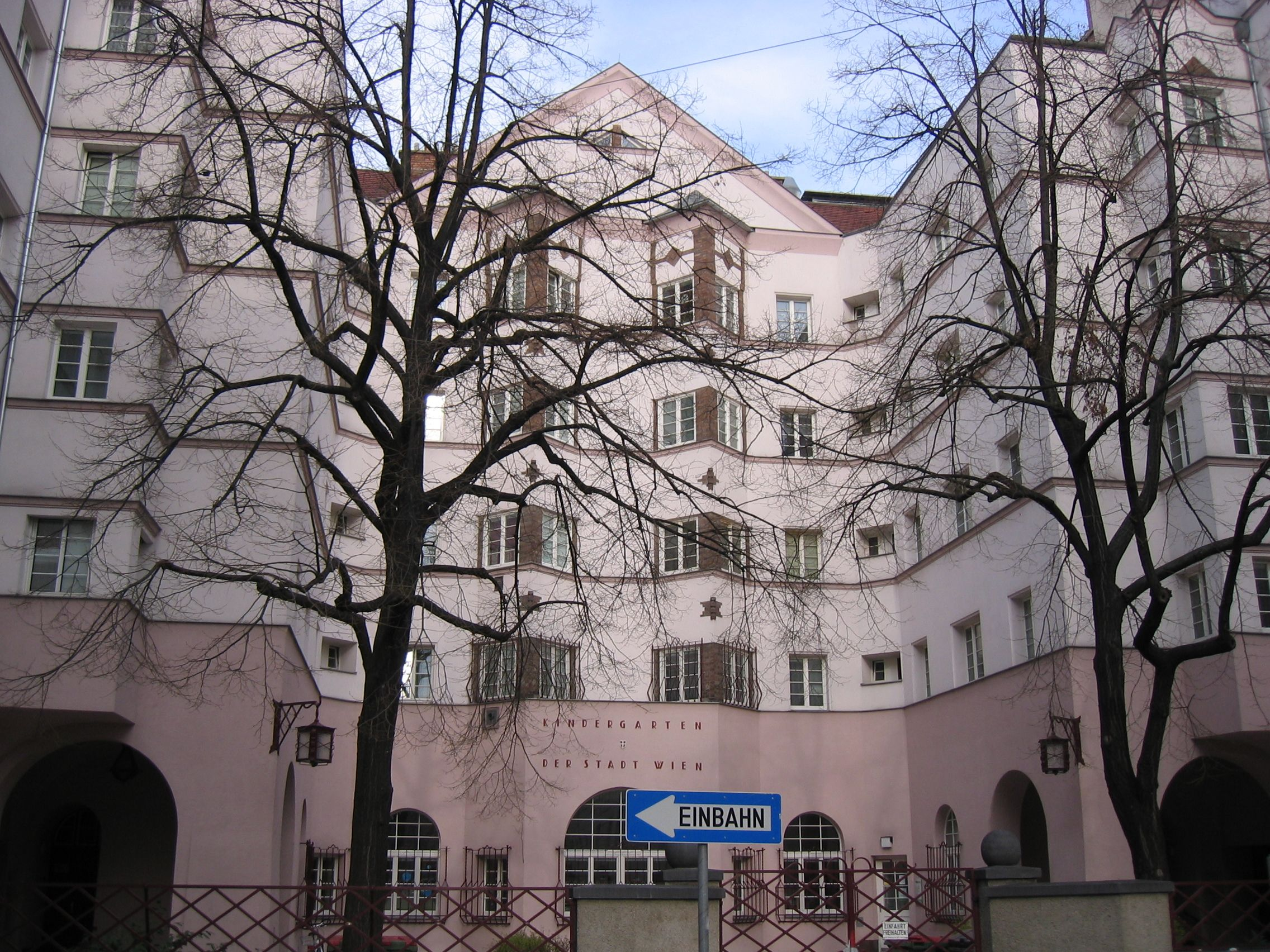 Heine hof - Innenhof mit Kindergarten